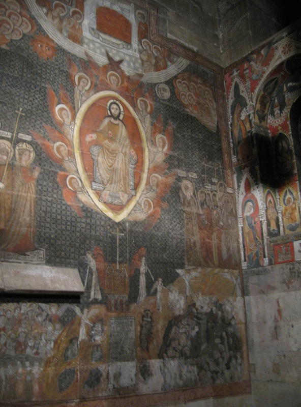 Capilla de San Martín o del Aceite, en el interior del cuerpo de la Torre de las Campanas. Catedral Vieja de Salamanca.